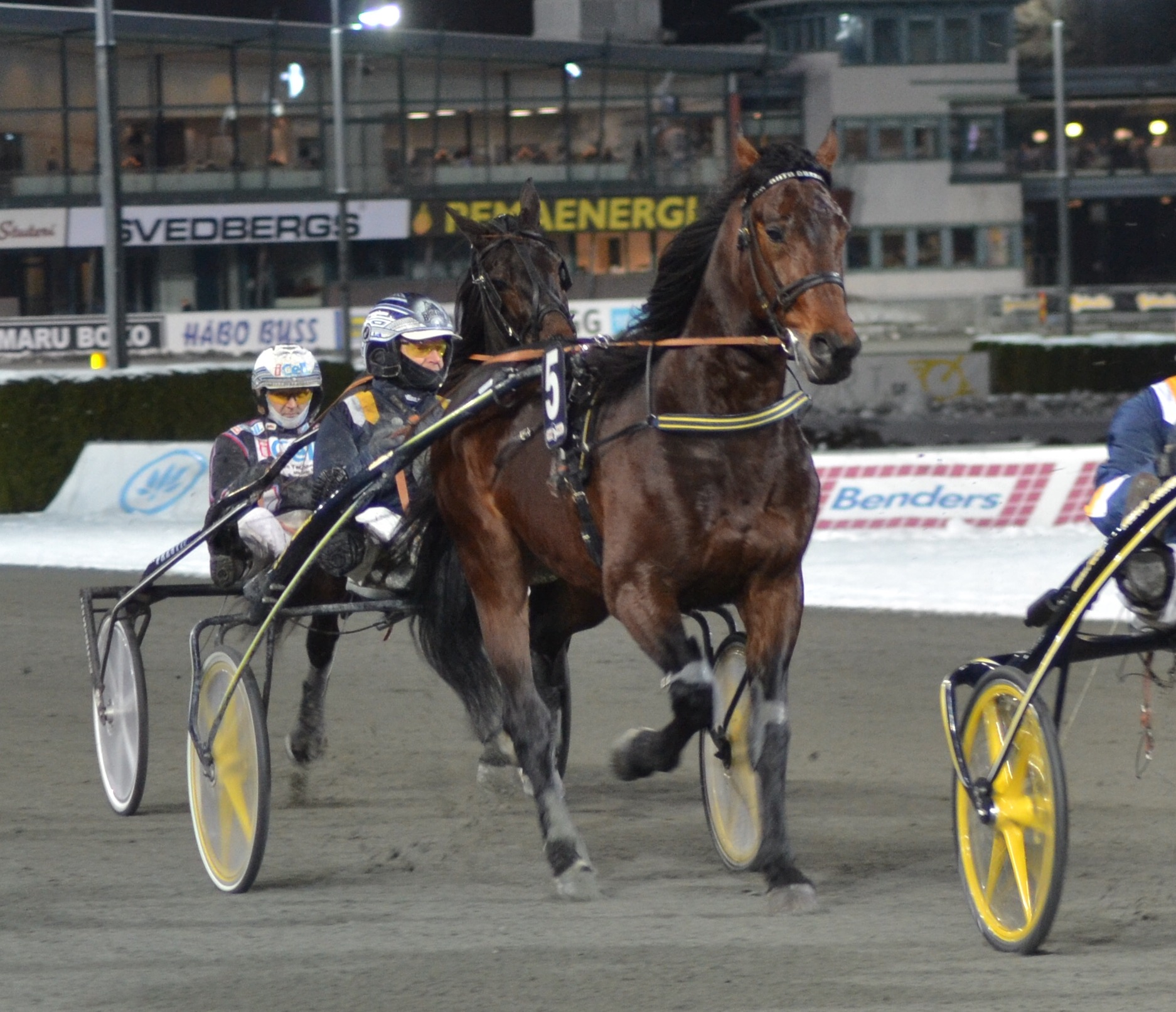 Nato Dream (tränad av Stefan Melander) inför Gösta Nordins Lopp på Solvalla 2017-12-13.